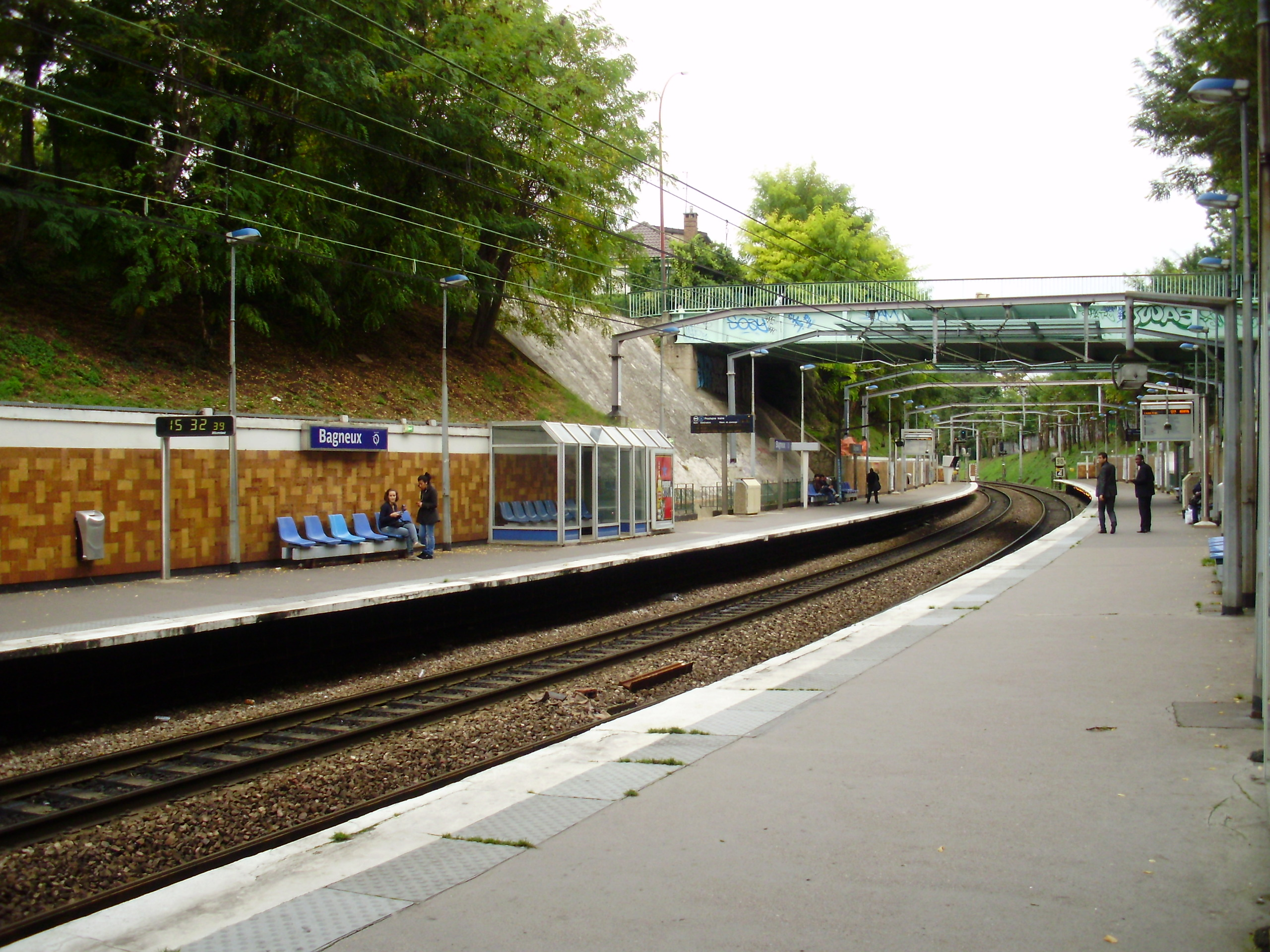 Gare de Bagneux, à Cachan, Val-de-Marne, France (vue en direction d'Aéroport CDG 2/Mitry - Claye depuis le quai pour Robinson/Saint-Rémy-lès-Chevreuse)